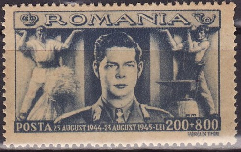 Почтовая марка Румынии 1945 года, посвящённая годовщине антифашистского переворота